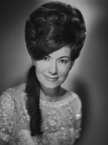 Dottie West, promotional photograph, circa 1965.